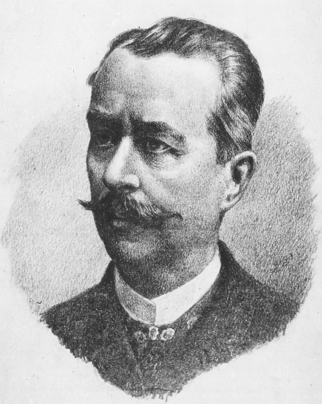 Andrej Vavken (1838-1898), Slovene composer and musician.